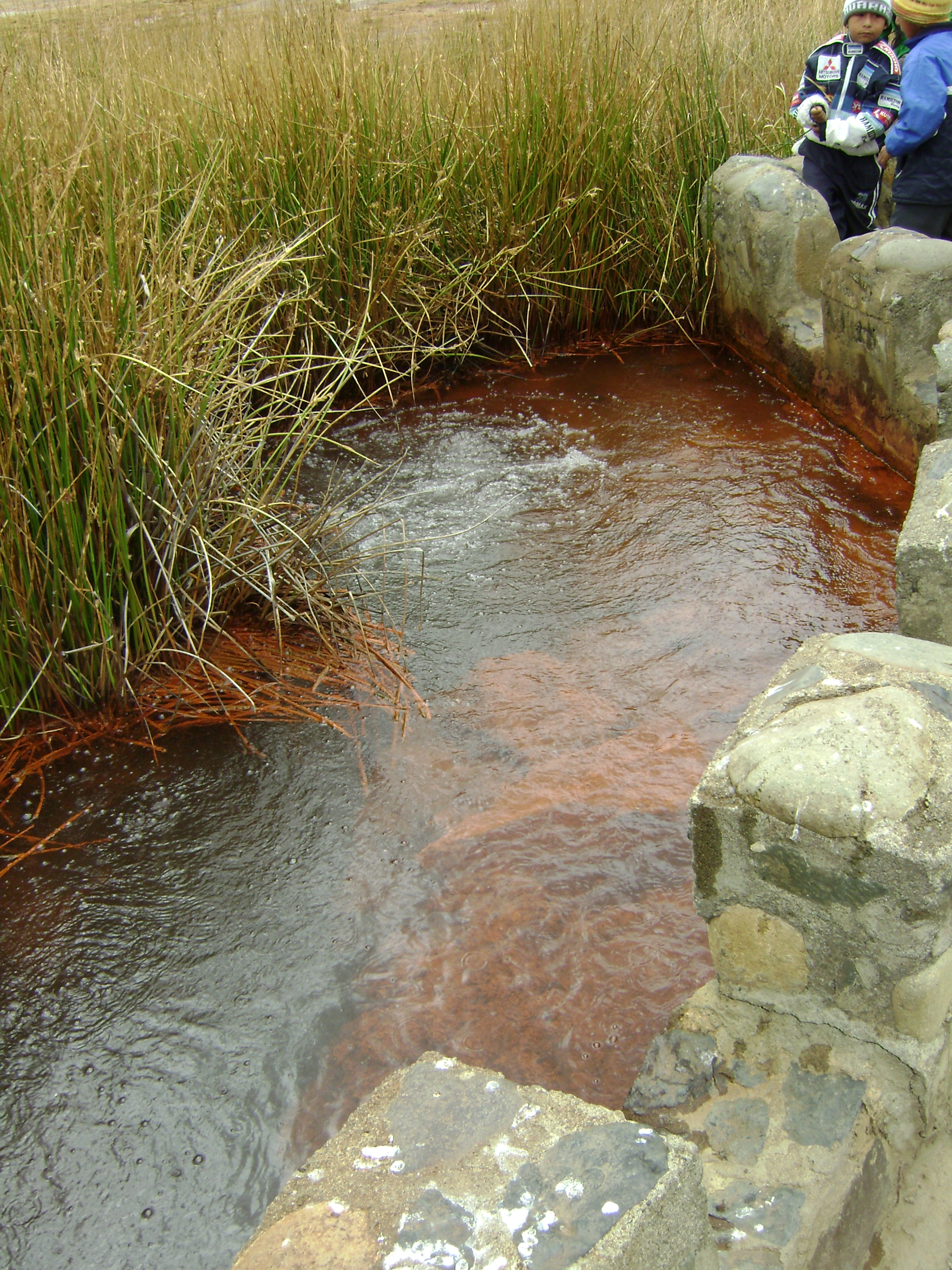 Imagen de una fuente de agua gasificada natural en el camino al Nevado Pastoruri en Ancash-Perú.